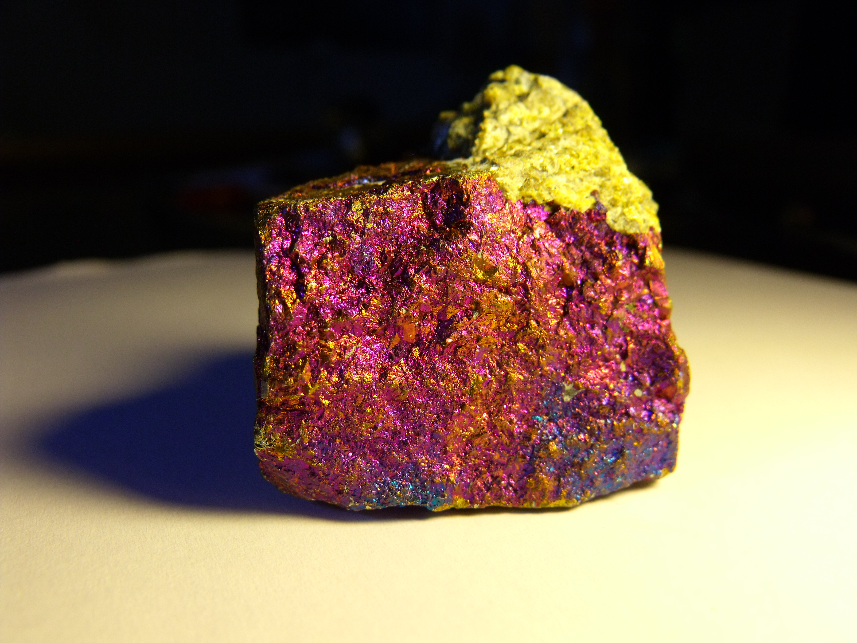 Chalkopyrit aus Italien